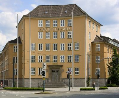 Der historische Eingang der Unternehmenszentrale von HOCHTIEF.